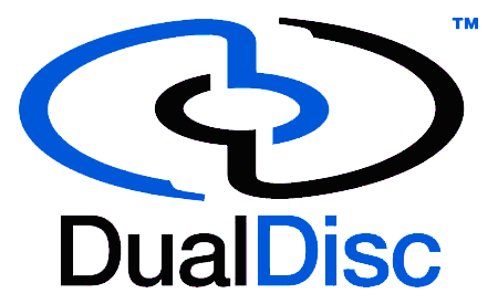 Logo DualDisc